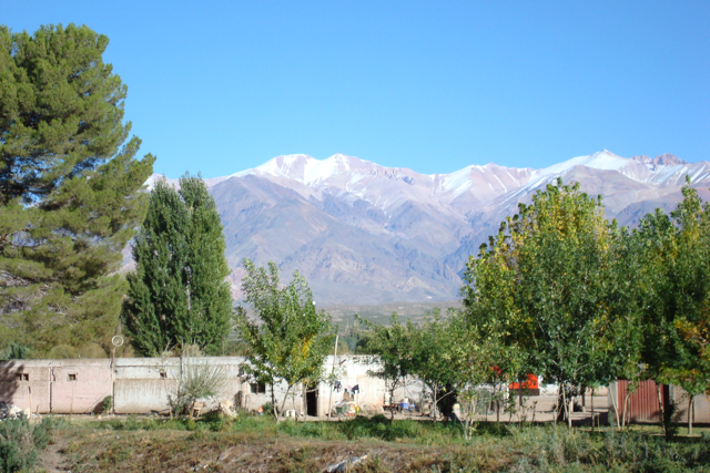 Uspallata